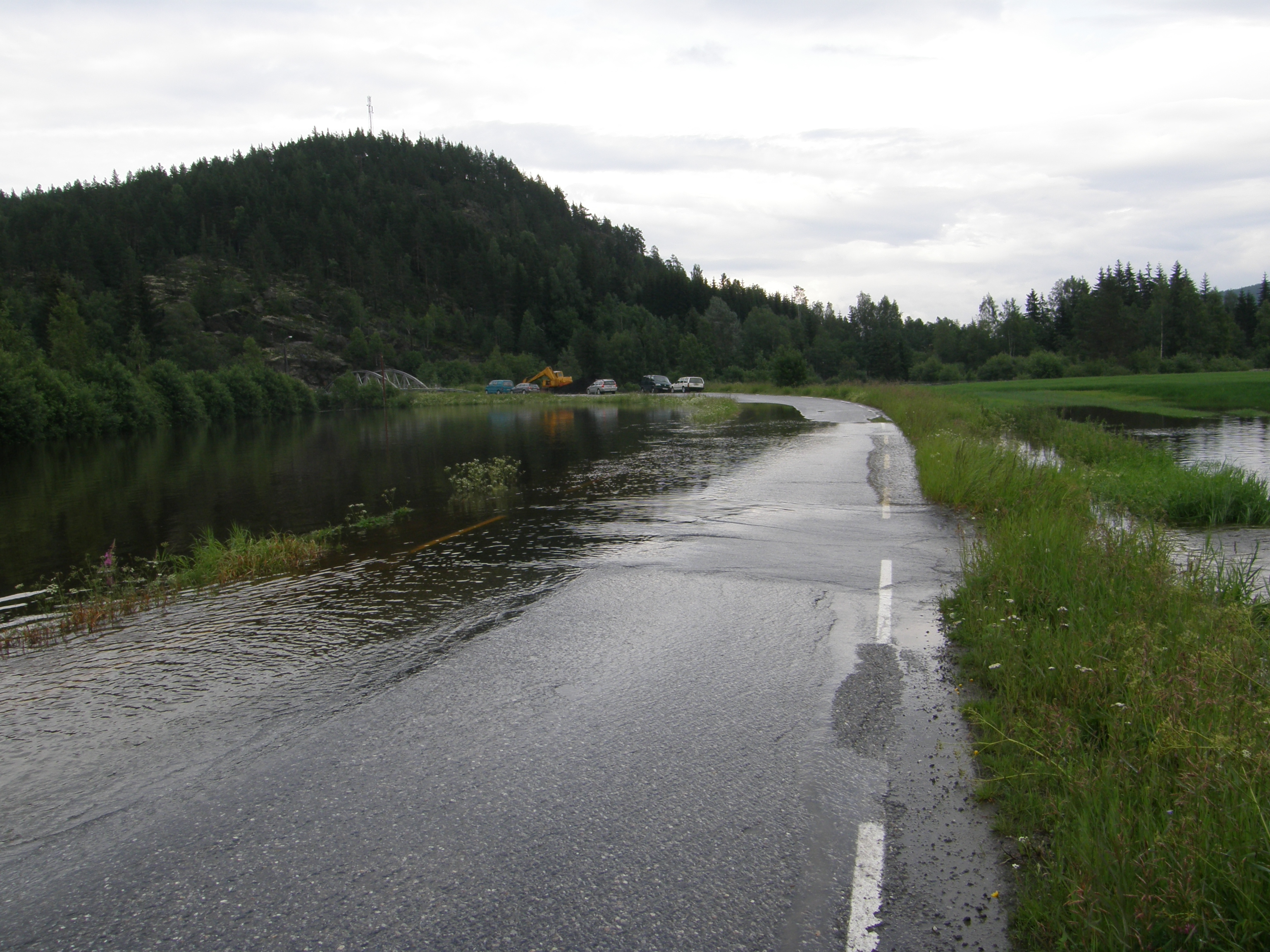 Sogna (flomstor i juli 2007, Bårnås)